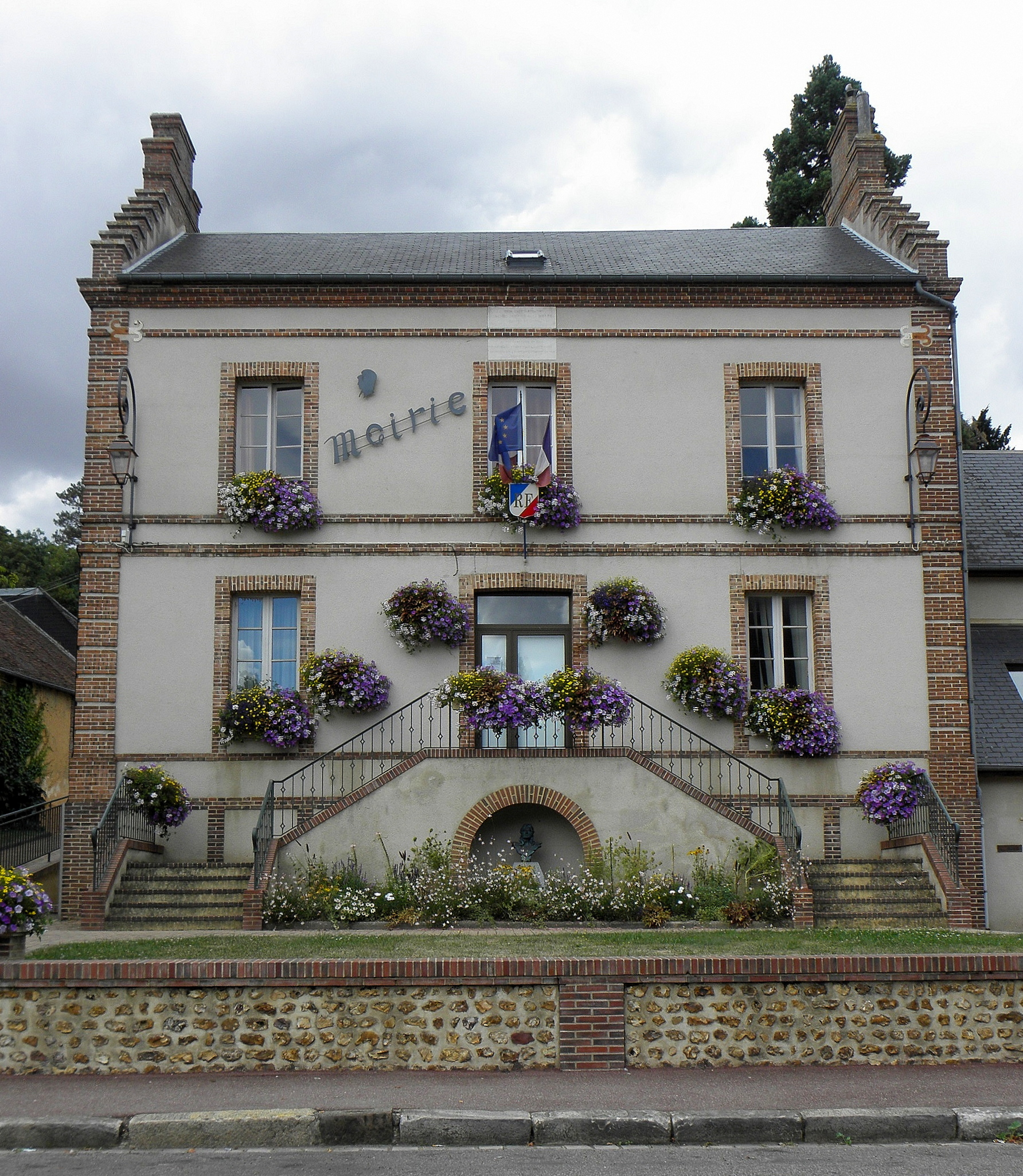 Mairie de Tillières-sur-Avre (27).